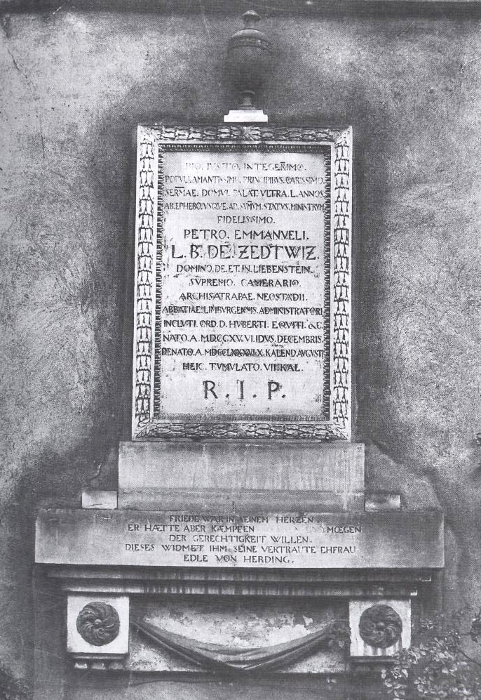 Epitaph des Grafen Peter Emanuel von Zedtwitz (1715-1786), Kurpfälzischer Minister, St. Sebastian Kirche Ludwighafen Mundenheim, 1910